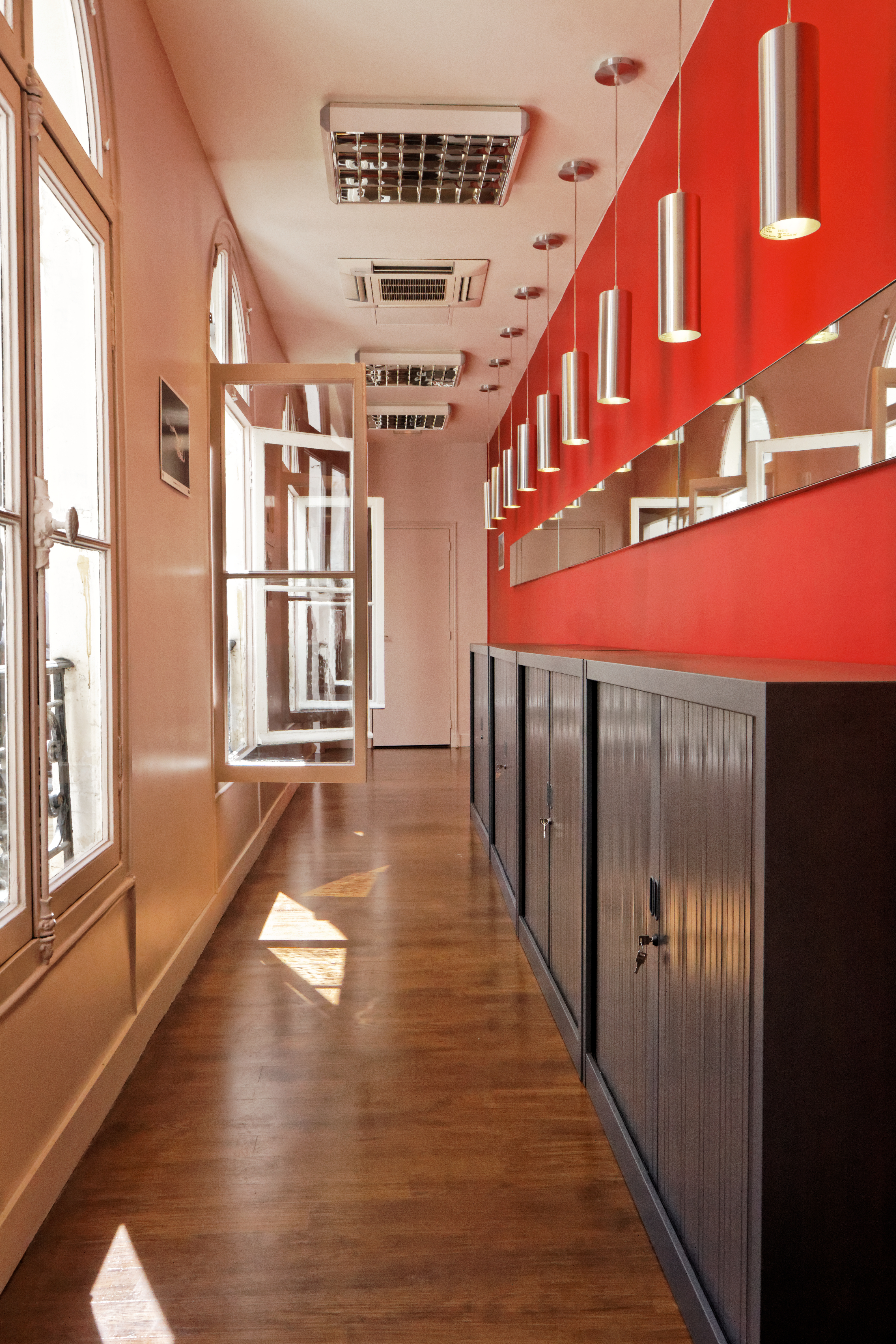 Inauguration des locaux de Wikimedia France rue de Cléry le 14 juin 2014.